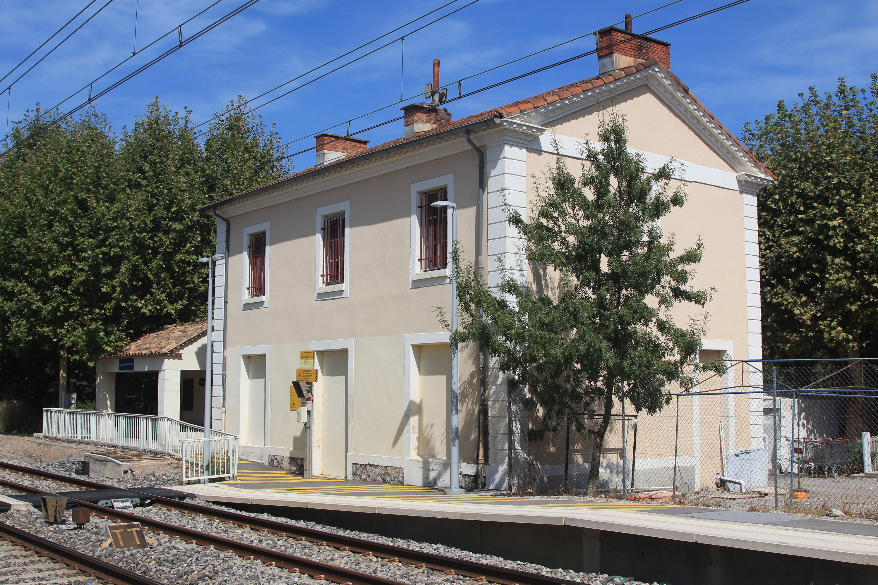 Bâtiment voyageurs et abris de quai pour la direction de Sète de la gare de Villeneuve-lès-Maguelone vus vers Montpellier.